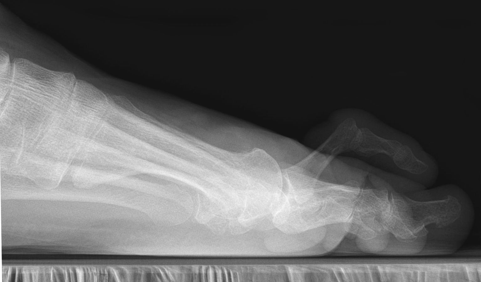 Röntgenbild im streng seitlichen Strahlengang im Stehen von einer Krallenzehe bei D2 mit deutlich überstrecktem Grundgelenk. Die Zehenspitze liegt nicht mehr dem Boden auf. Die 64-jährigen Patientin litt auch an einem Hallux valgus.